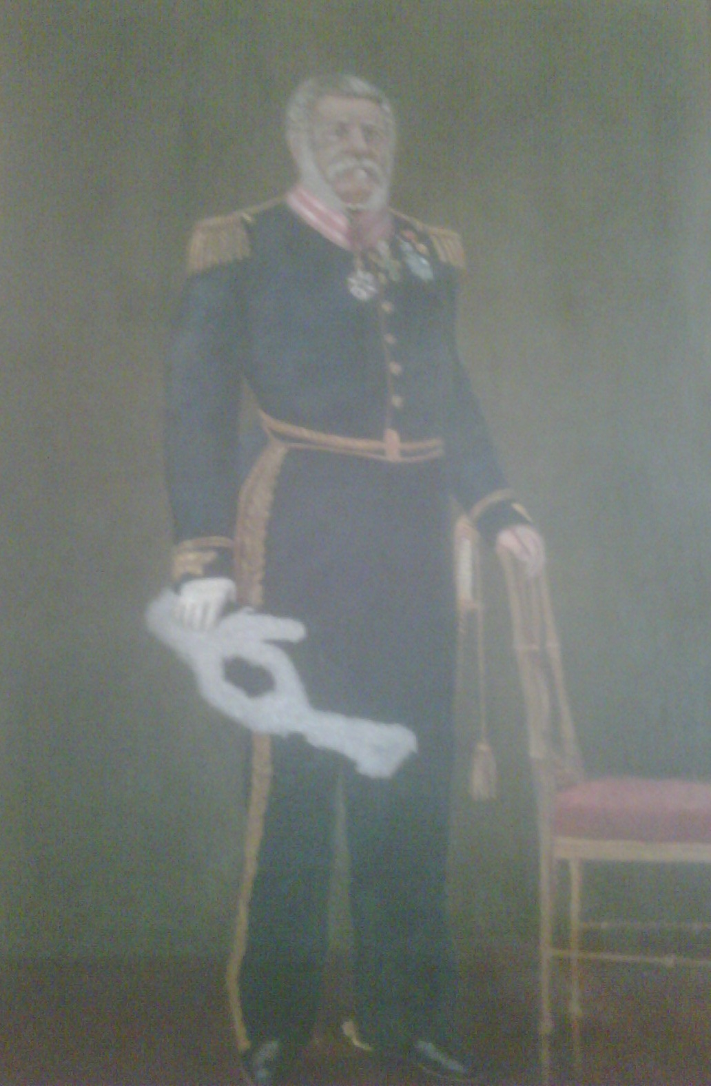 Retrato do 1º Comandante da Guarda Policial da Província do Rio de Janeiro, João Nepomuceno Castrioto. Autor desconhecido, Obra produzida pela Polícia Militar do Estado do Rio de Janeiro, em exposição no Museu da Corporação.